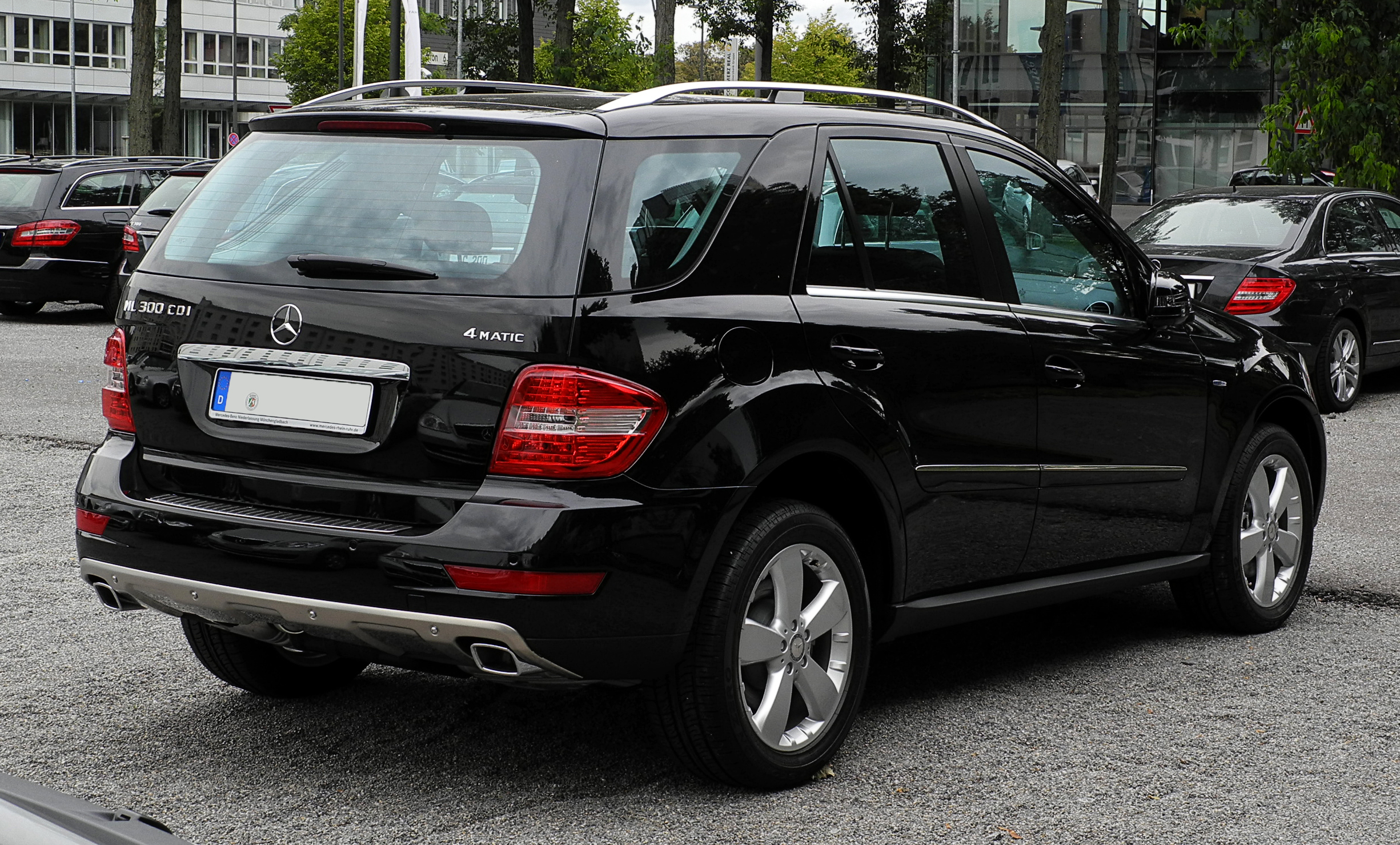 Mercedes-Benz ML 300 CDI BlueEFFICIENCY 4MATIC (W 164, Facelift)